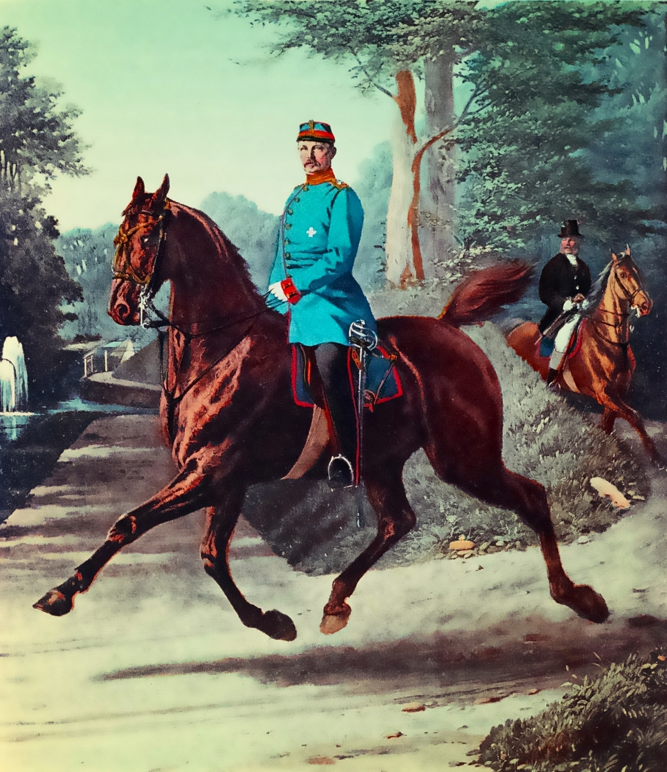 Regimentskommandeur von Kahlden, Dragoner-Regiment Nr. 17, um 1865